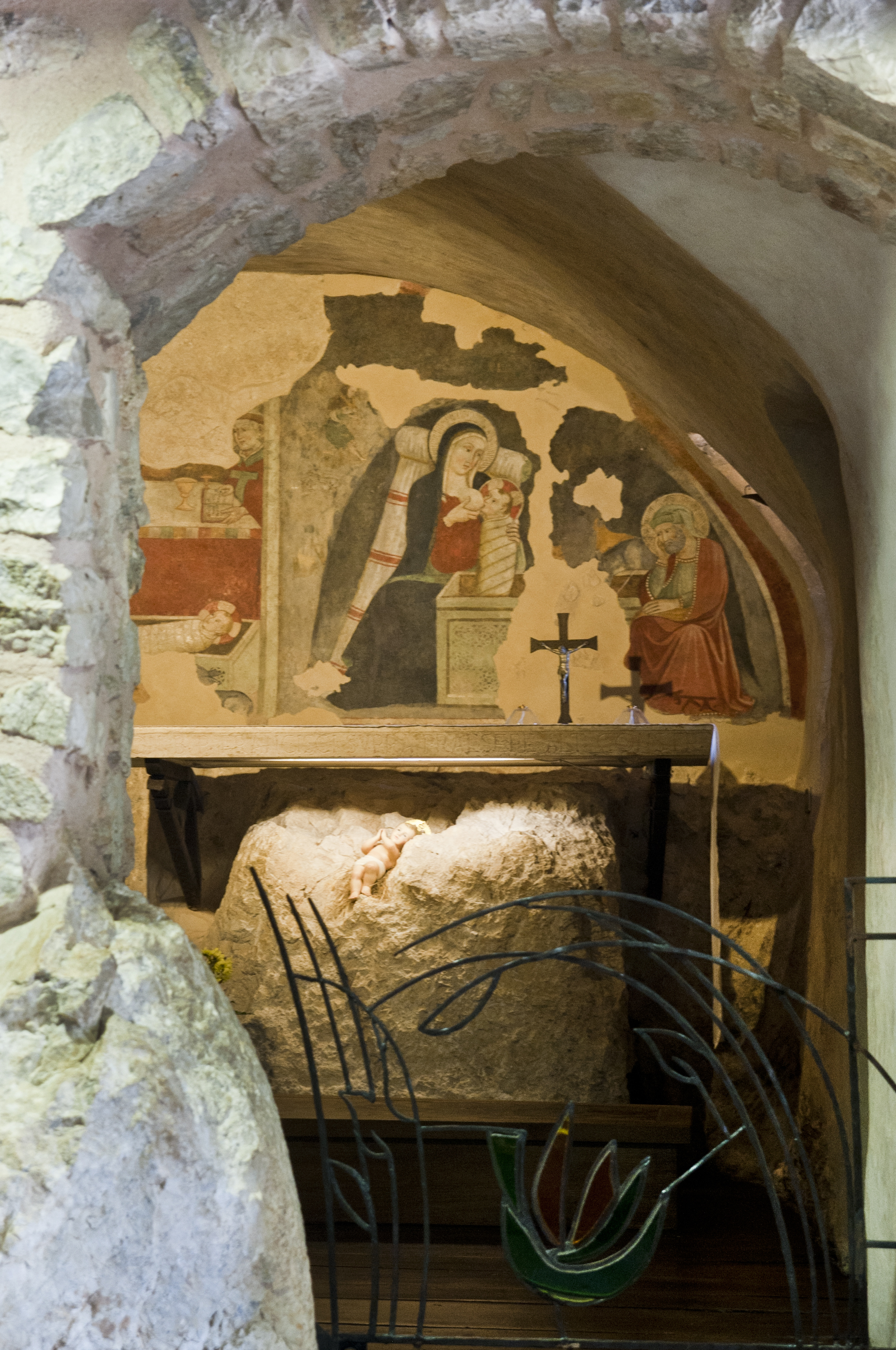 Grotta del primo presepe santuario di Greccio This is a photo of a monument which is part of cultural heritage of Italy. Questa è una foto di un bene culturale italiano che partecipa al concorso Wiki Loves Valle del Primo Presepe 2019, gestito in coperazione con Wikimedia Italia. This is a photo of a monument which is part of cultural heritage of Italy. This monument participates in the contest Wiki Loves Valle del Primo Presepe 2019, operated in cooperation with Wikimedia Italia.